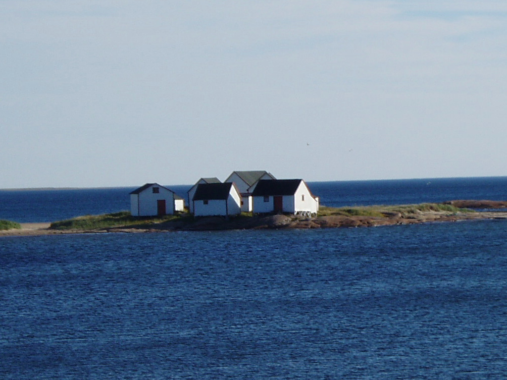 Die ehemaligen Fischerhütten von Natashquan ("Galets") geben eine sehr idyllische Kulisse ab. Natashquan liegt am Ende der Landstrasse, die Montréal mit Québec und der Côte-Nord verbindet. Alle östlich davon gelegenen Ortschaften sind nur per Schiff oder aus der Luft erreichbar.